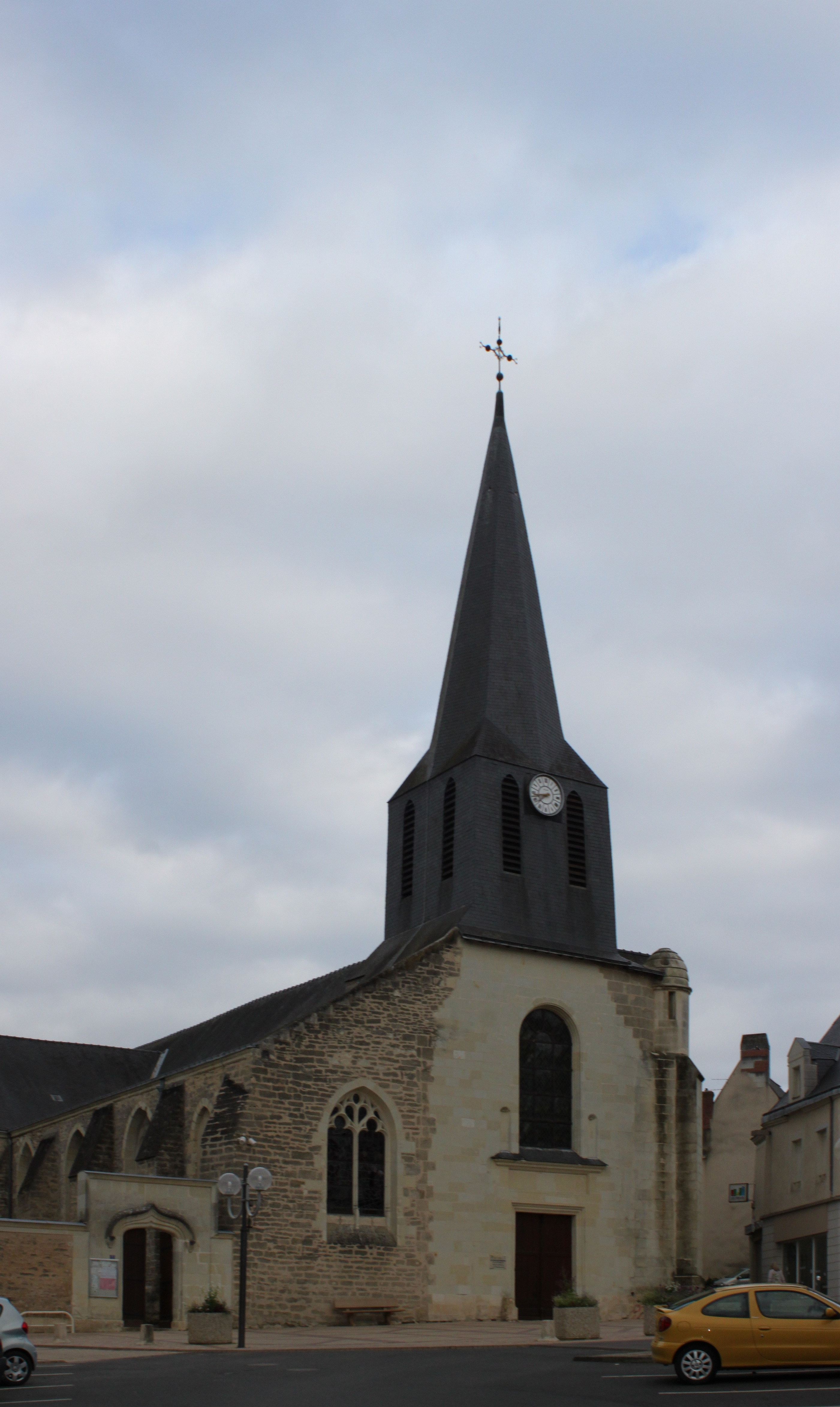 Église Saint-Pierre, Fr-49-Doué-la-Fontaine.